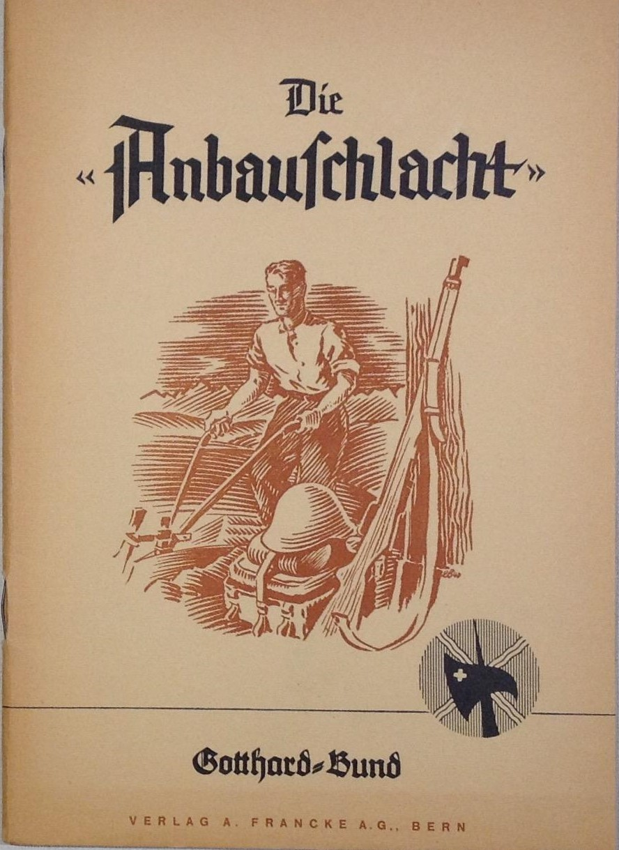 Die Anbauschlacht, Gotthardbund, Schweiz